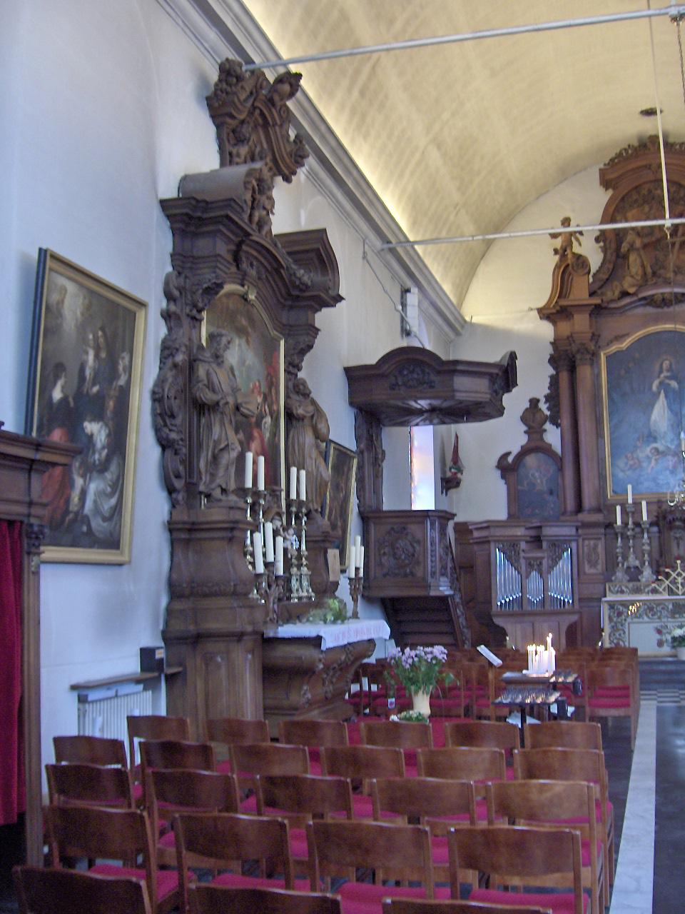 Left aisle in the Kapucijnenkerk; Ostend, Belgium